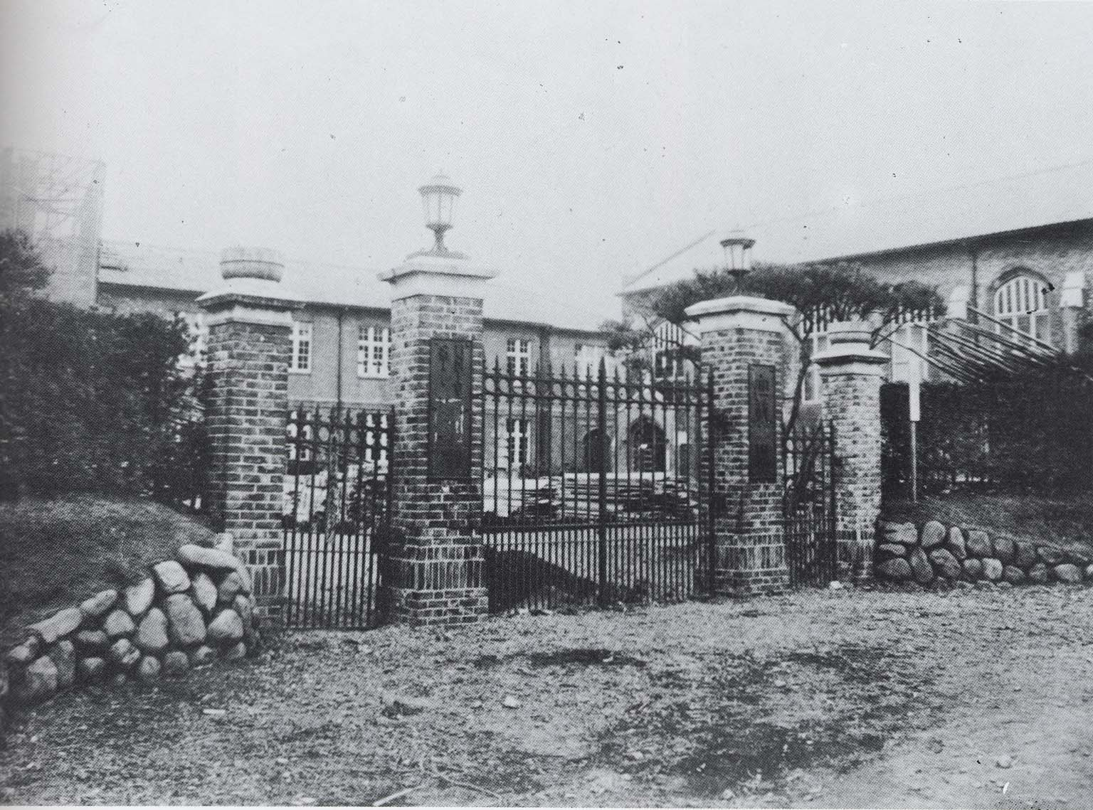 大正14年頃の立教大学正門